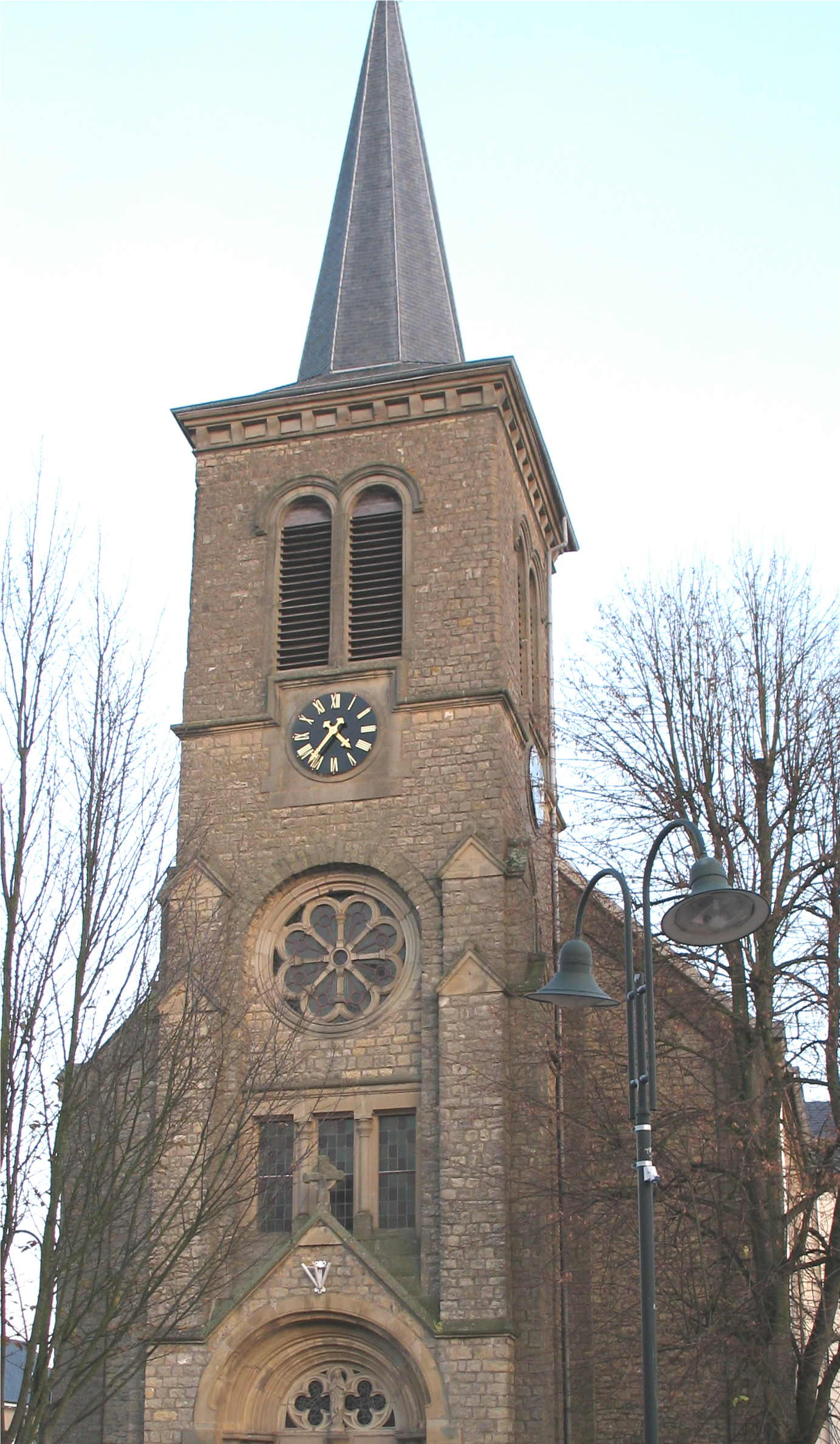 De Kierchtuerm vu Gouschtengen